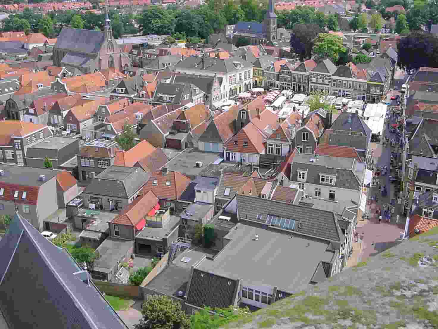 Foto centrum van Steenwijk, gemaakt vanaf de St Clemenstoren met Sony Cybershot camera, bewerkt met XnView.